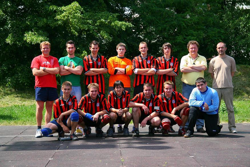 Mužstvo mužů NH Veselí nad Moravou